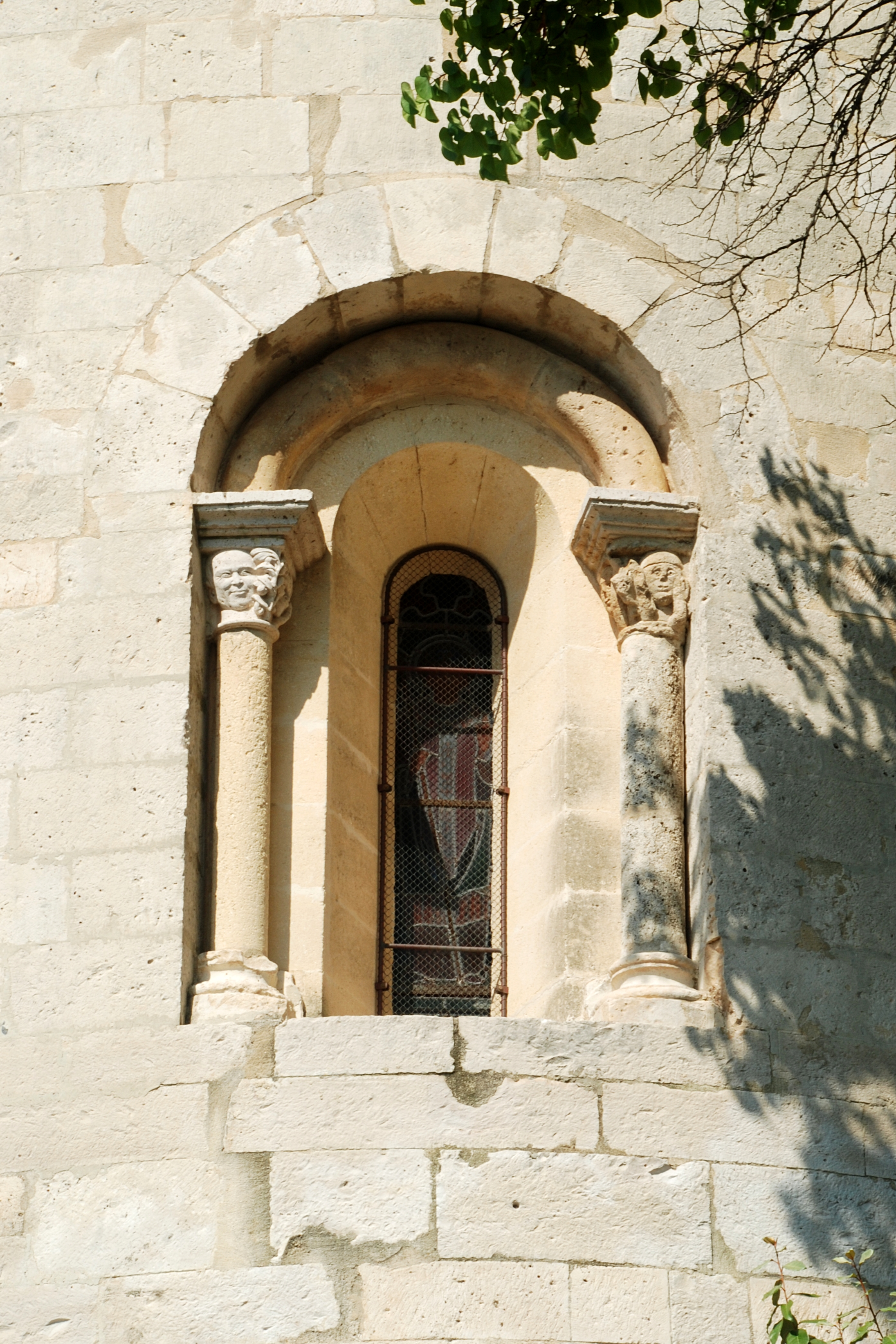 France - Languedoc - Hérault - Église Saint-Martial d'Assas